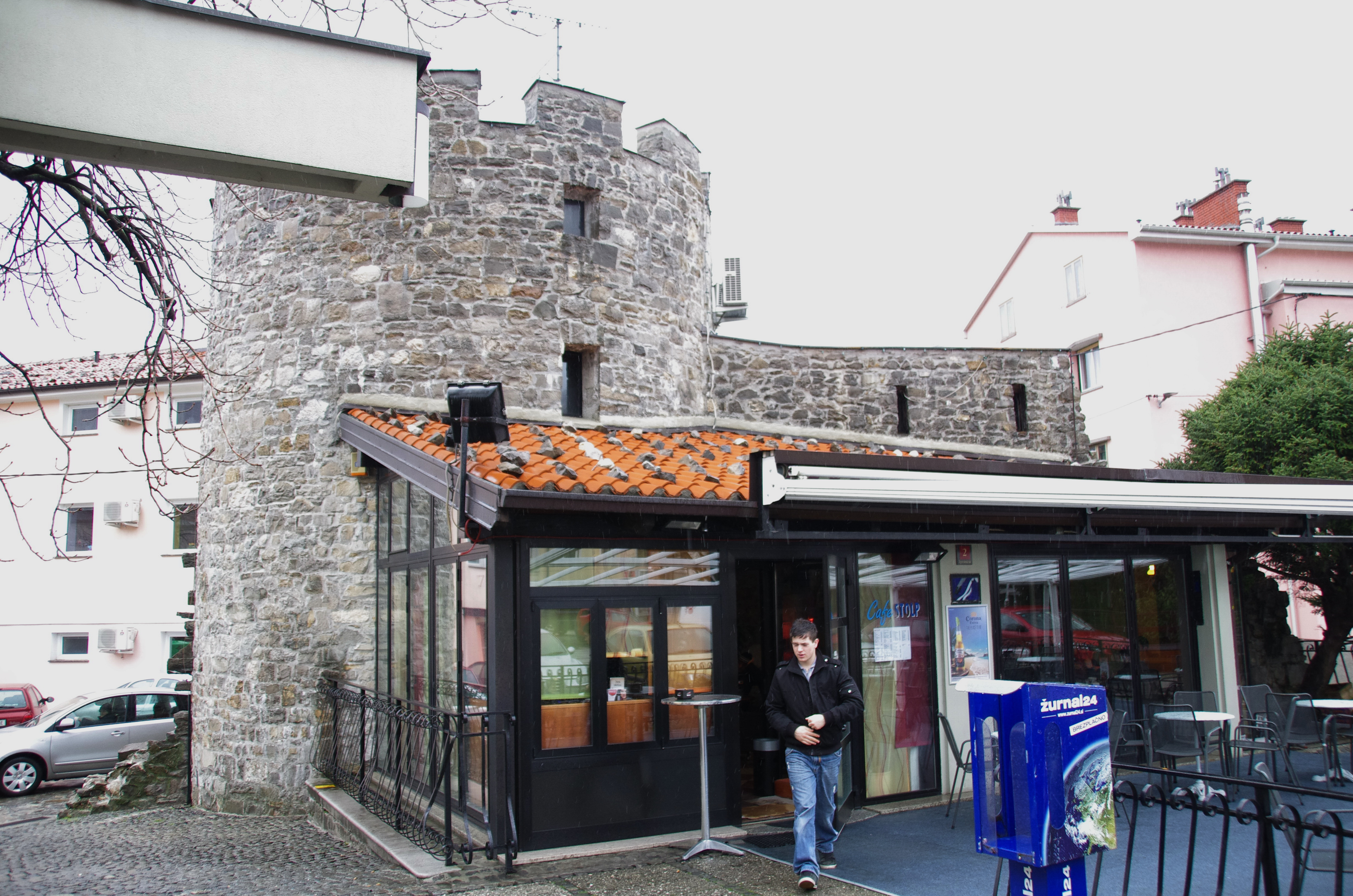 Šiška